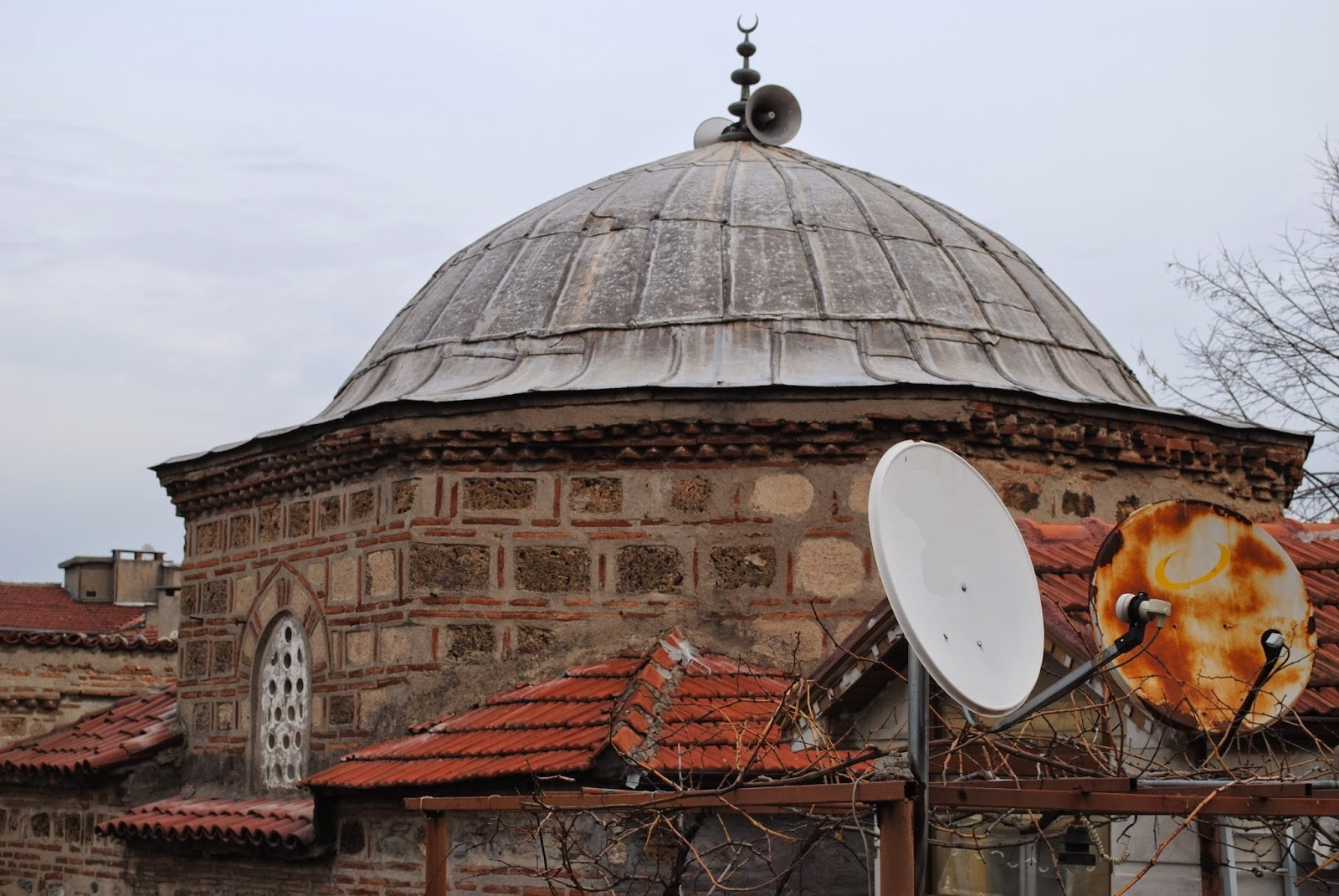 veledi yaniç kubbe 2